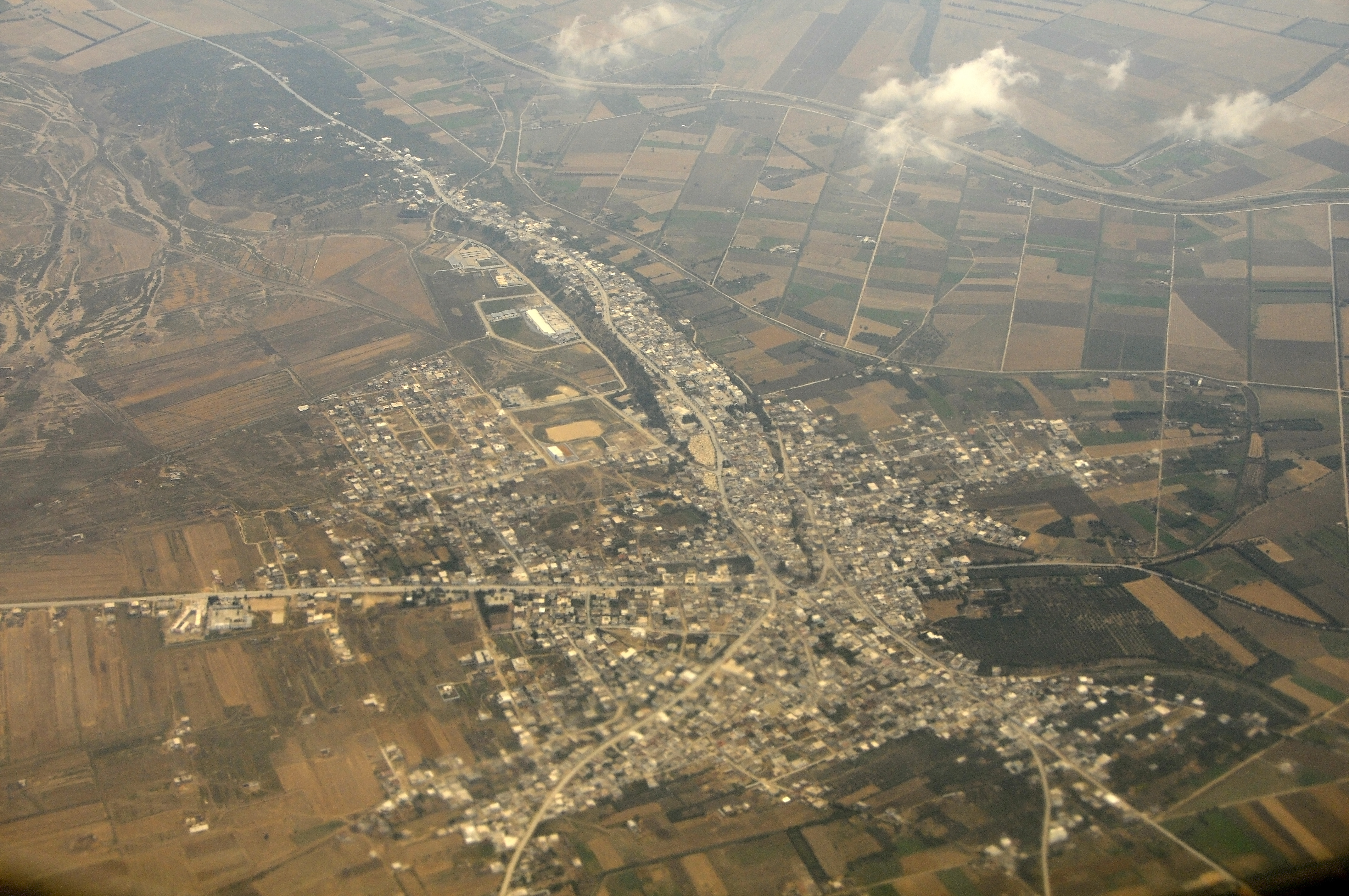 Vue aérienne de la ville de Kalâat_el-Andalous au nord-est de la Tunisie.